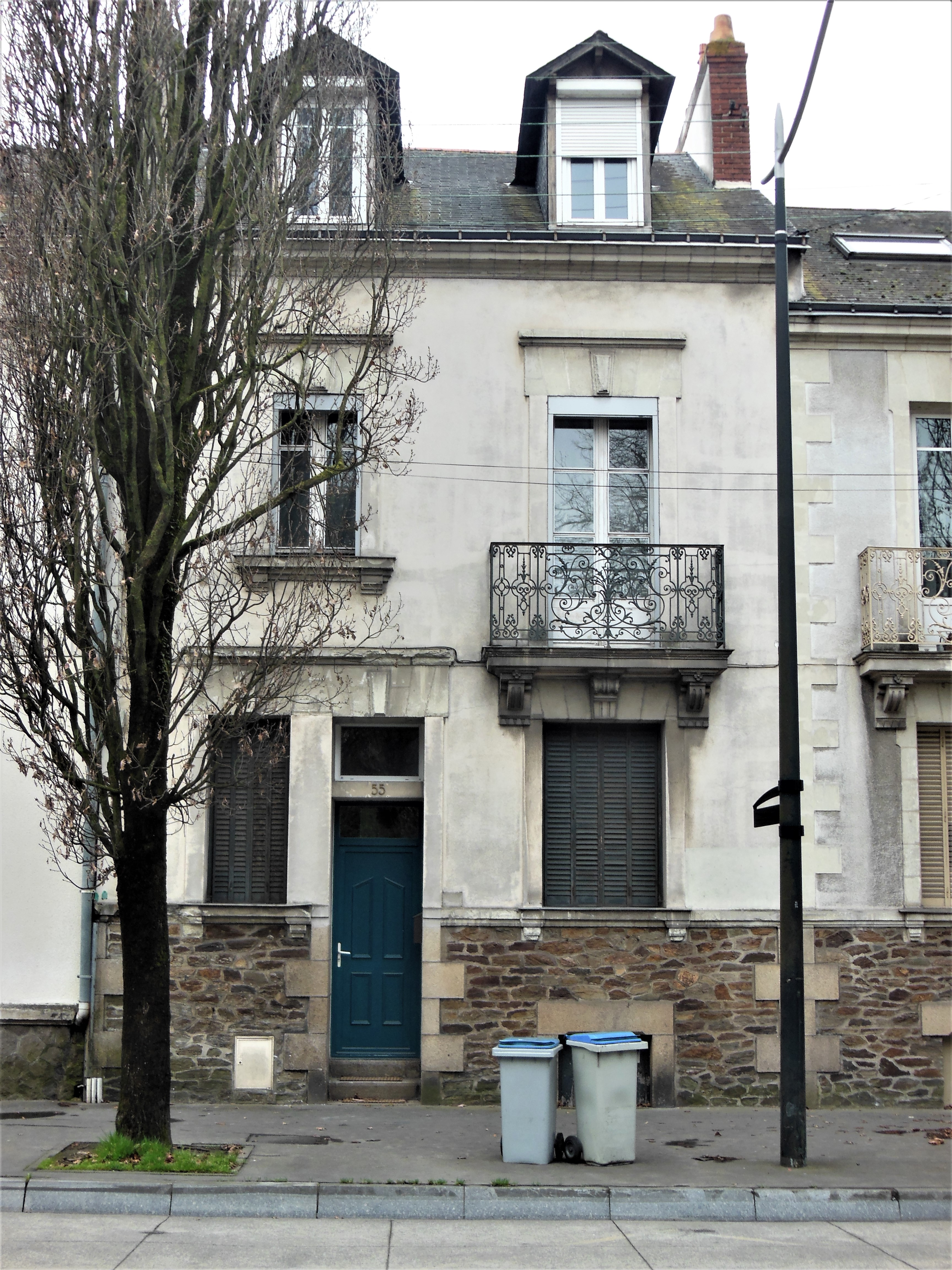 Façade du 55 boulevard Robert Schuman, à Nantes (France). Scène de crime dans l'affaire Dupont de Ligonnès